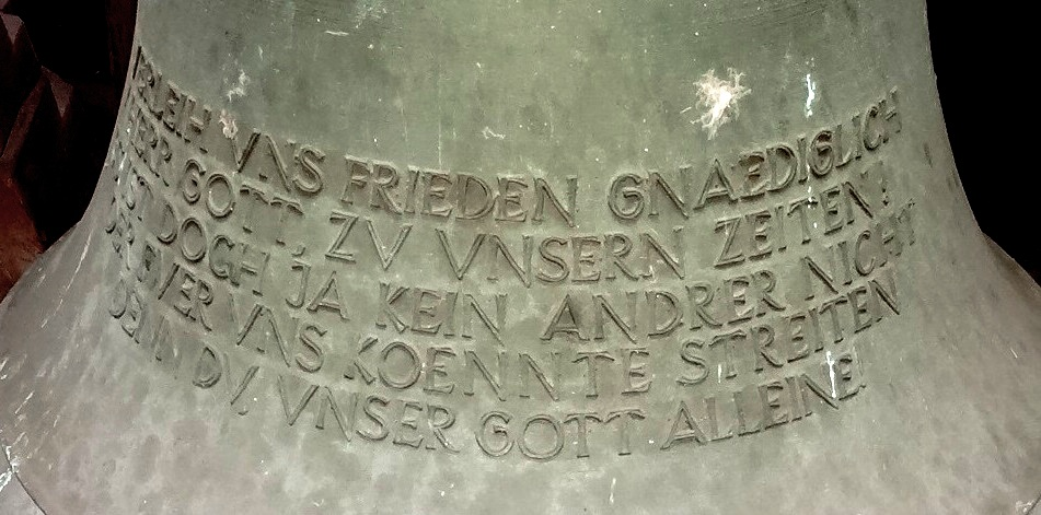 St. Michaelis Oberkleen, Glockeninschrift